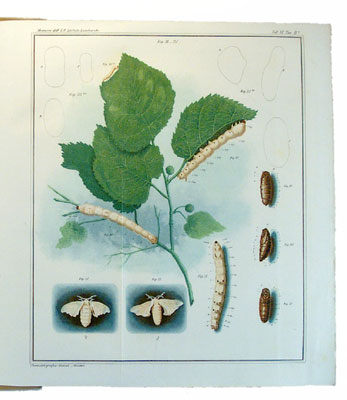 Plate from Monografia del bombice del gelso